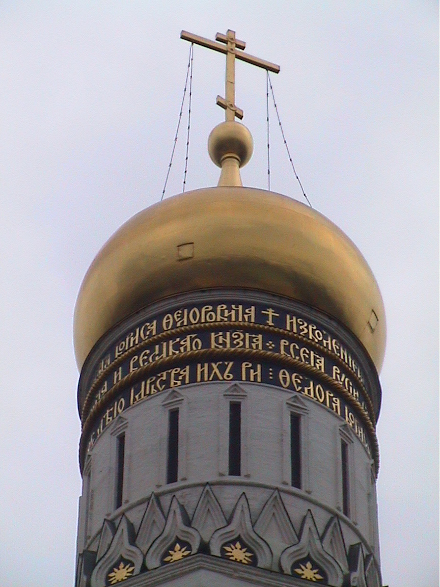 Coupole du clocher Ivan le Grand avec l'inscription commémorative de l'agrandissement de 1600